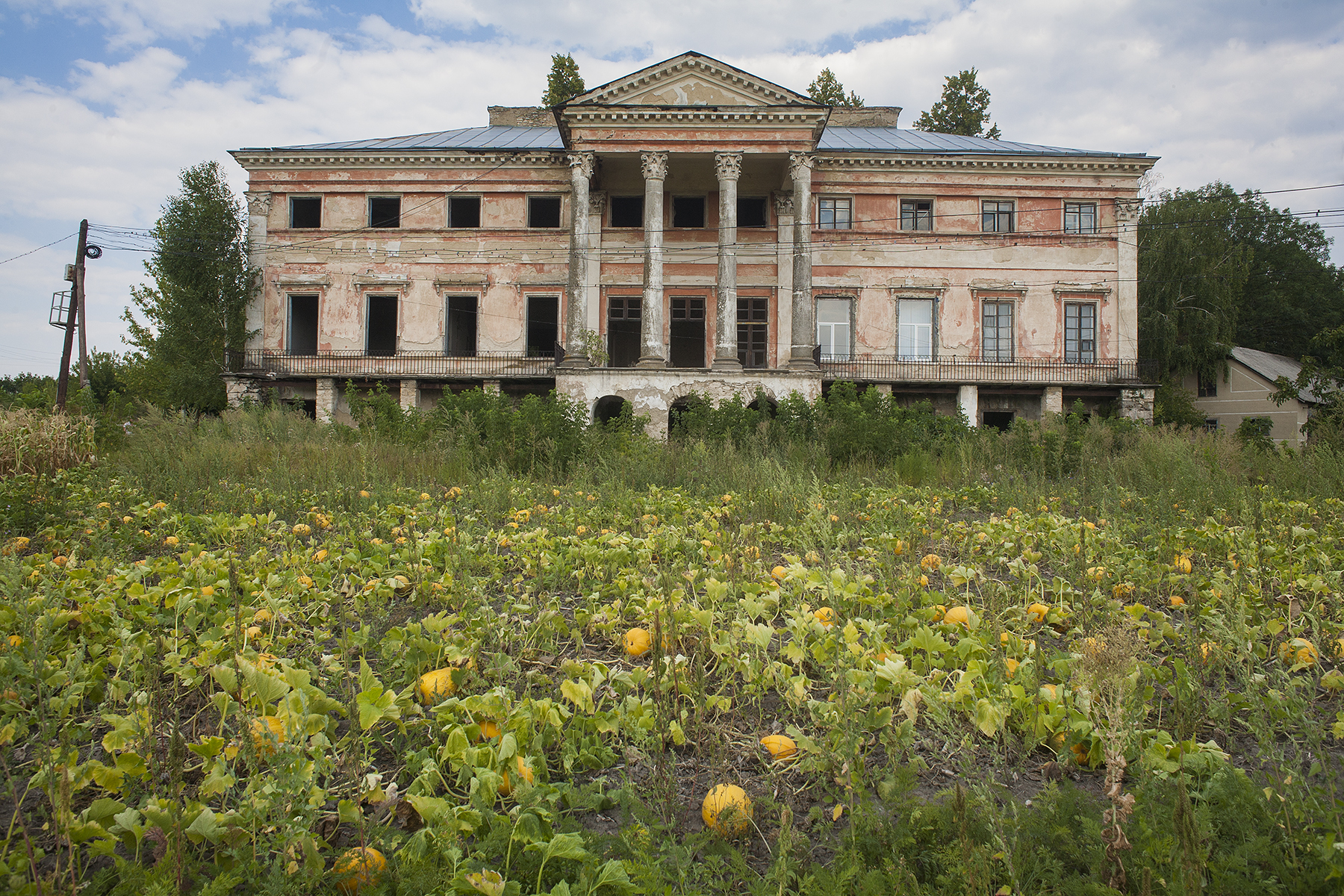 Палац, Серебринці